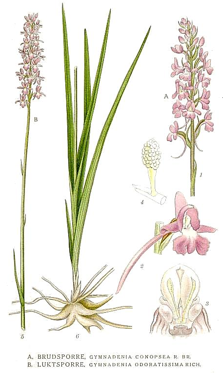 A. Gymnadenia conopsea (L.) R. Br. B. Gymnadenia odoratissima (L.) Rich. Original Description A. Brudsporre, Gymnadenia conopsea R. Br. B. Luktsporre, Gymnadenia odoratissima Rich.